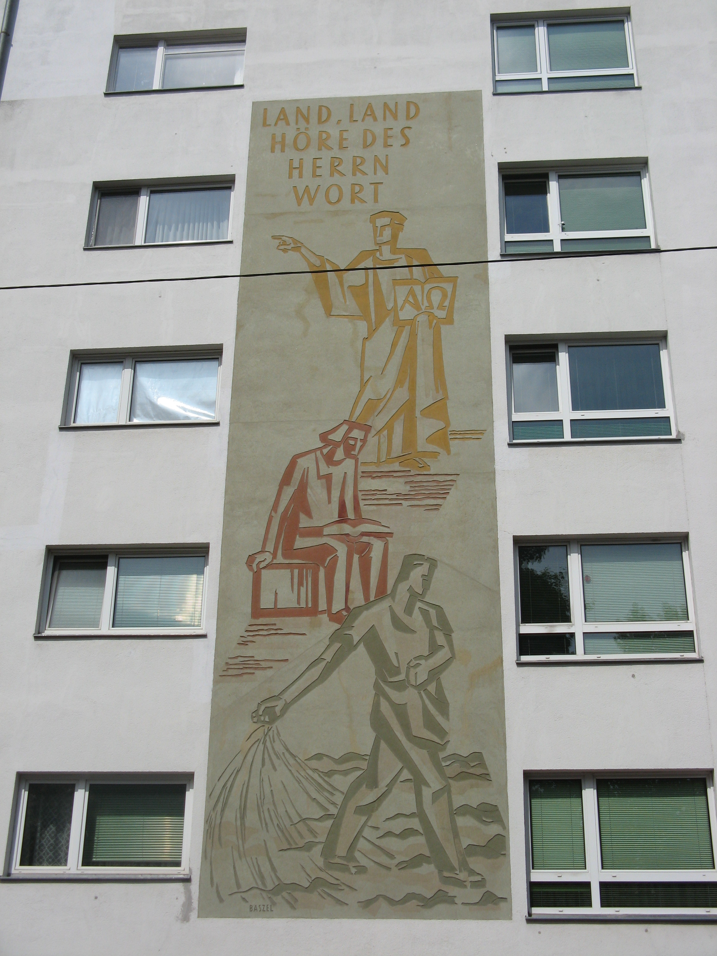 Land, Land höre des Herrn Wort! Sgraffito von Günther Baszel, Reformierte Erlöserkirche, Wielandgasse 9, Wien-Favoriten